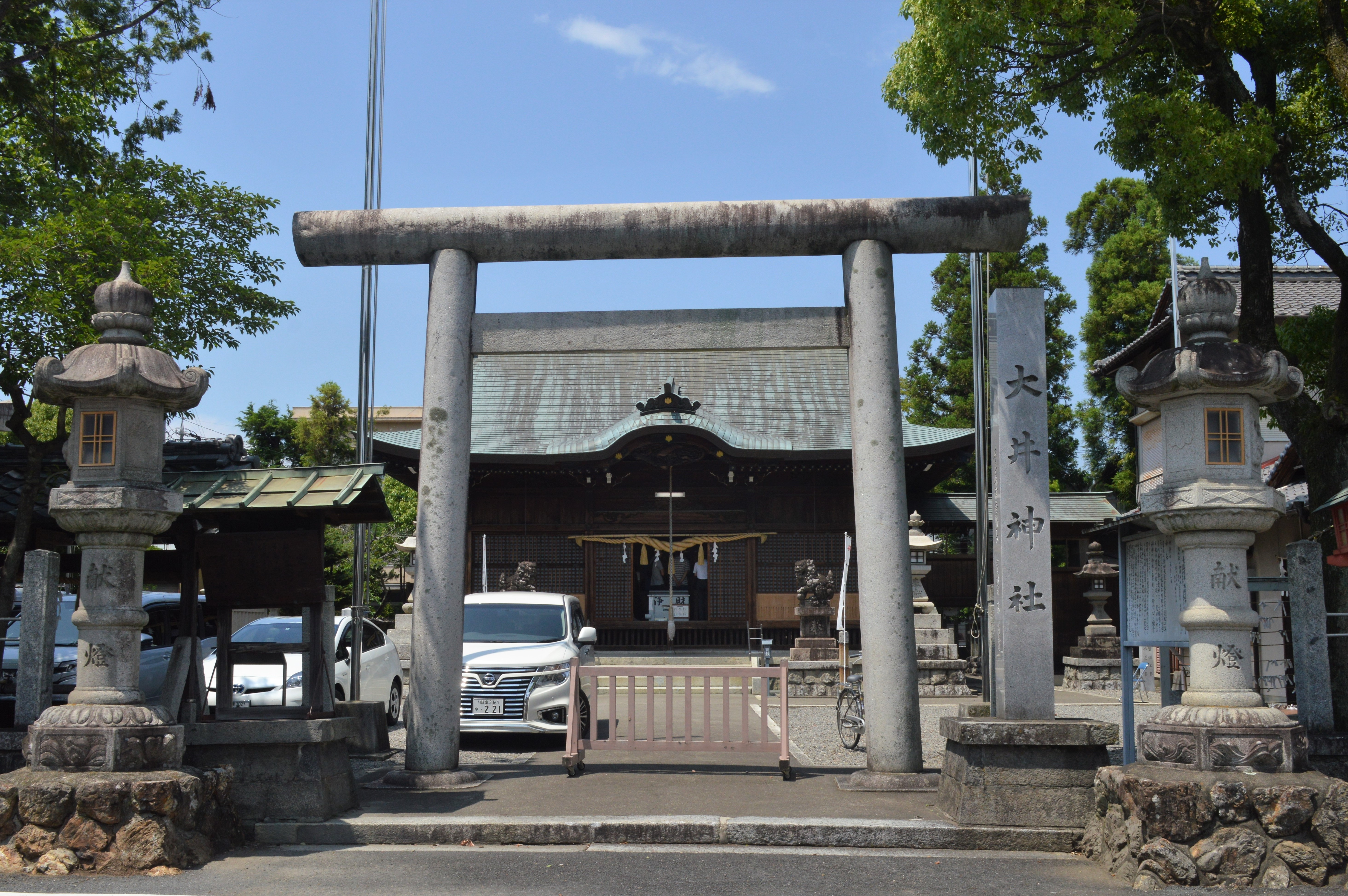 岐阜県本巣郡北方町にある大井神社。